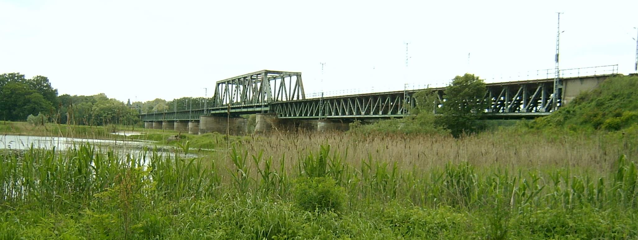 Eisenbahnbrücken-Grenzübergang Frankfurt (Oder) - Słubice/Świecko